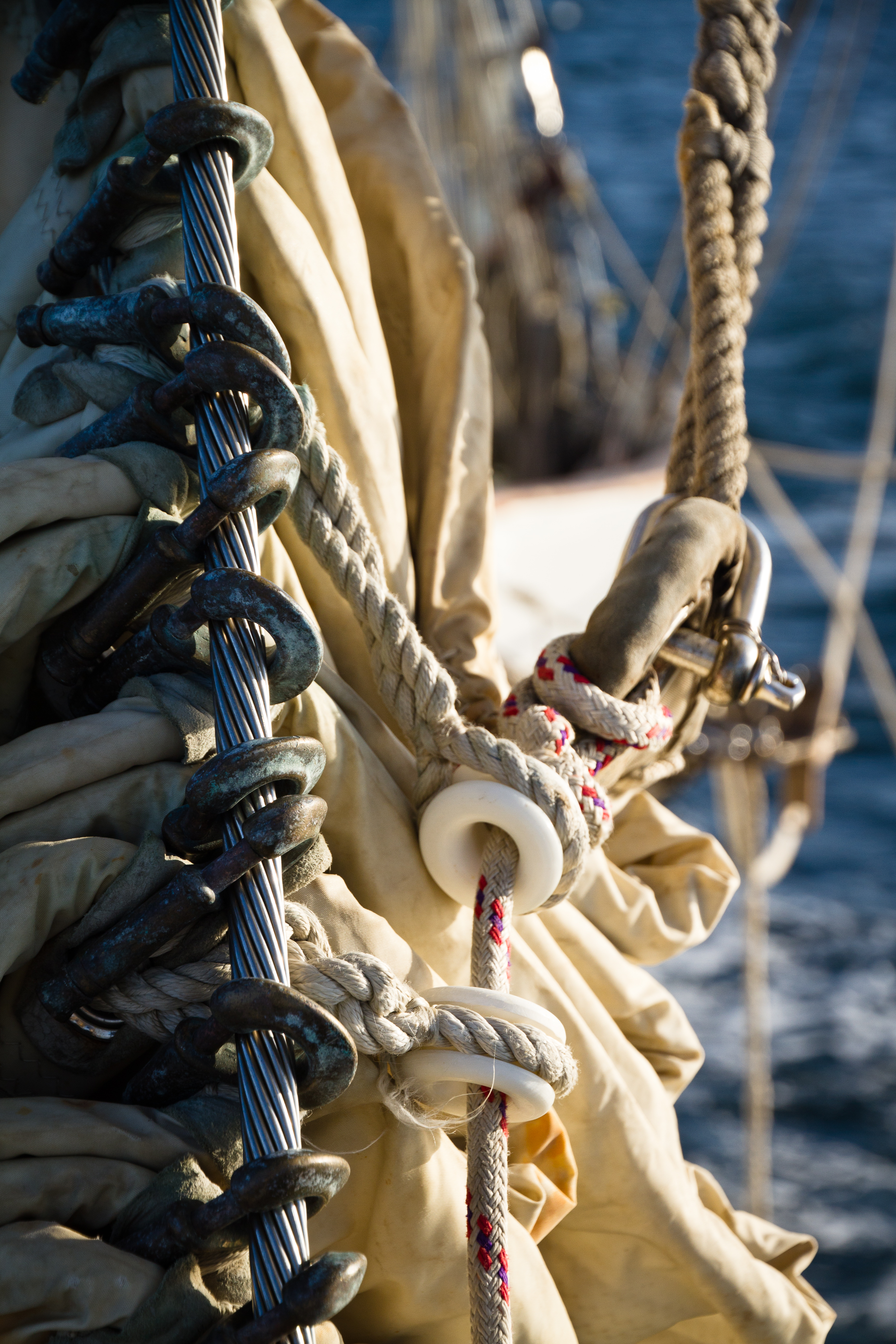 _MG_1657